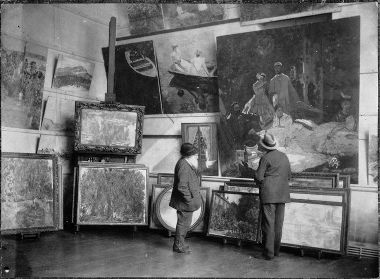 Monet dans son atelier